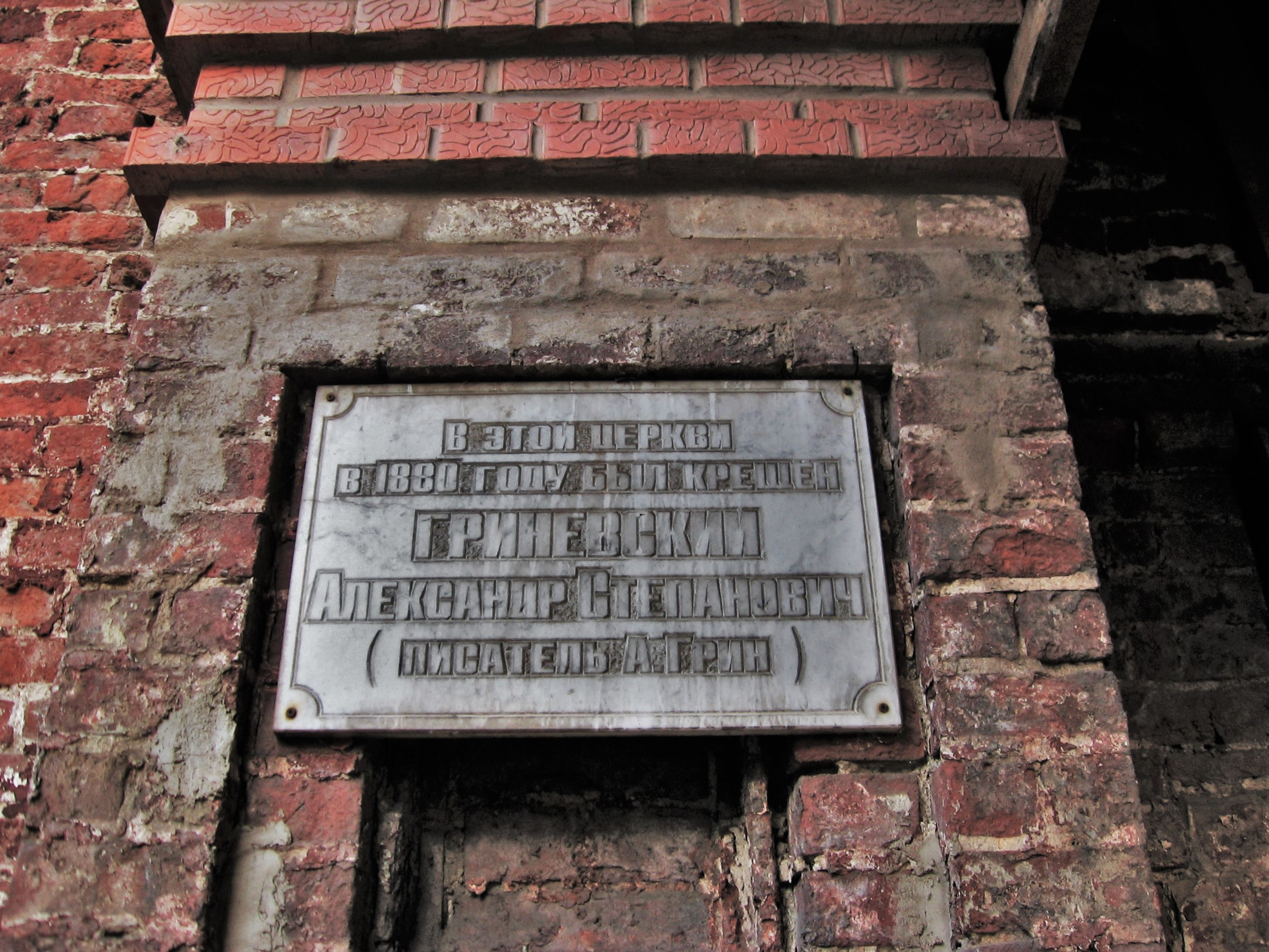 Мемориальная табличка в память крещения Александра Грина на церкви Николая Чудотворца в городе Слободском Кировской области